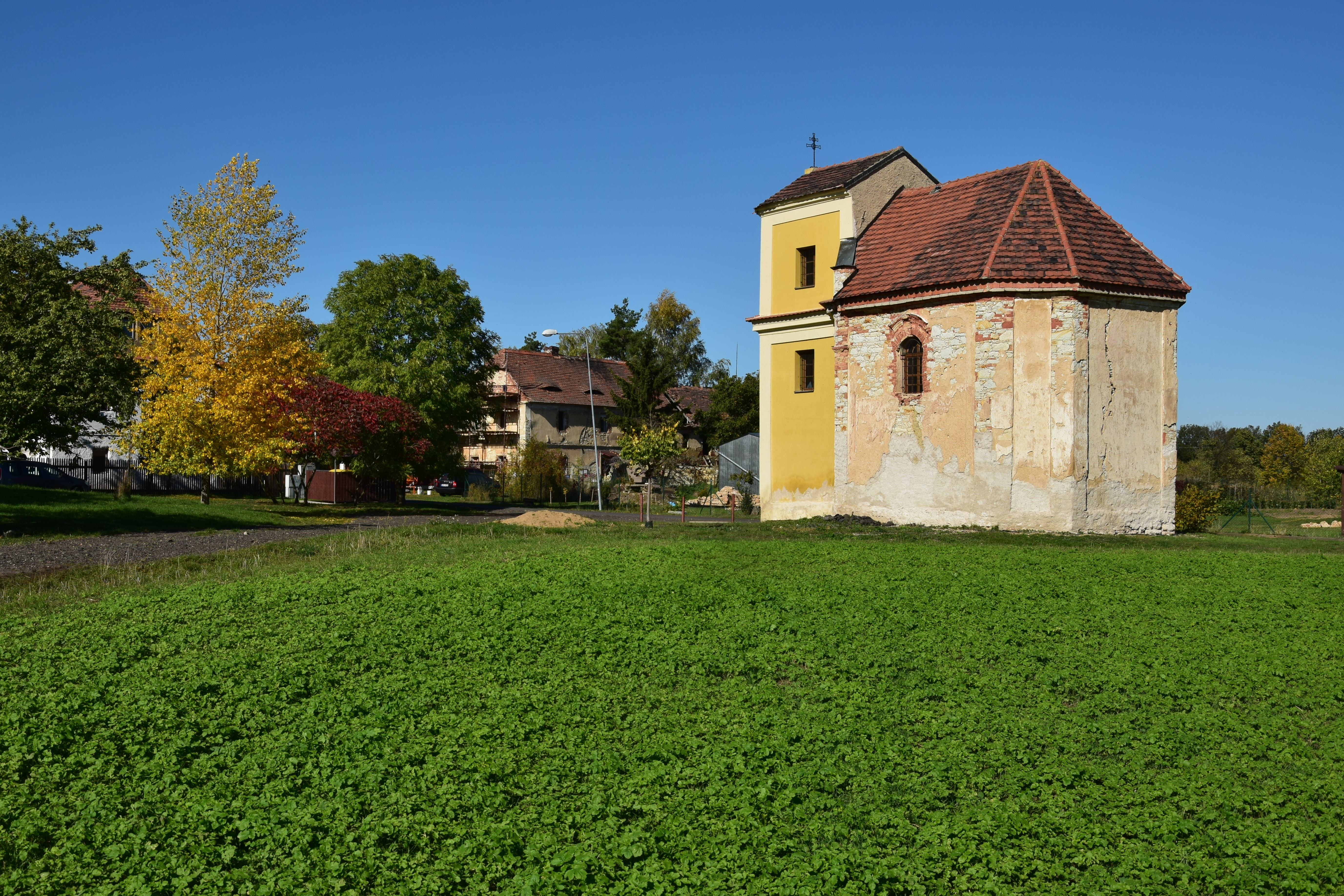 Kličín – kostel svatého Jana Nepomuckého z jihovýchodu